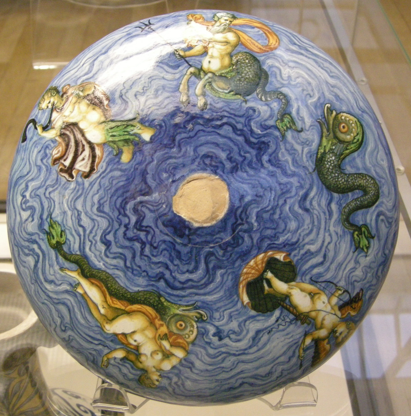 Urbino, bottega di guido durantino, piatto con soldati (r) e mostri marini (v), 1545-65 ca.